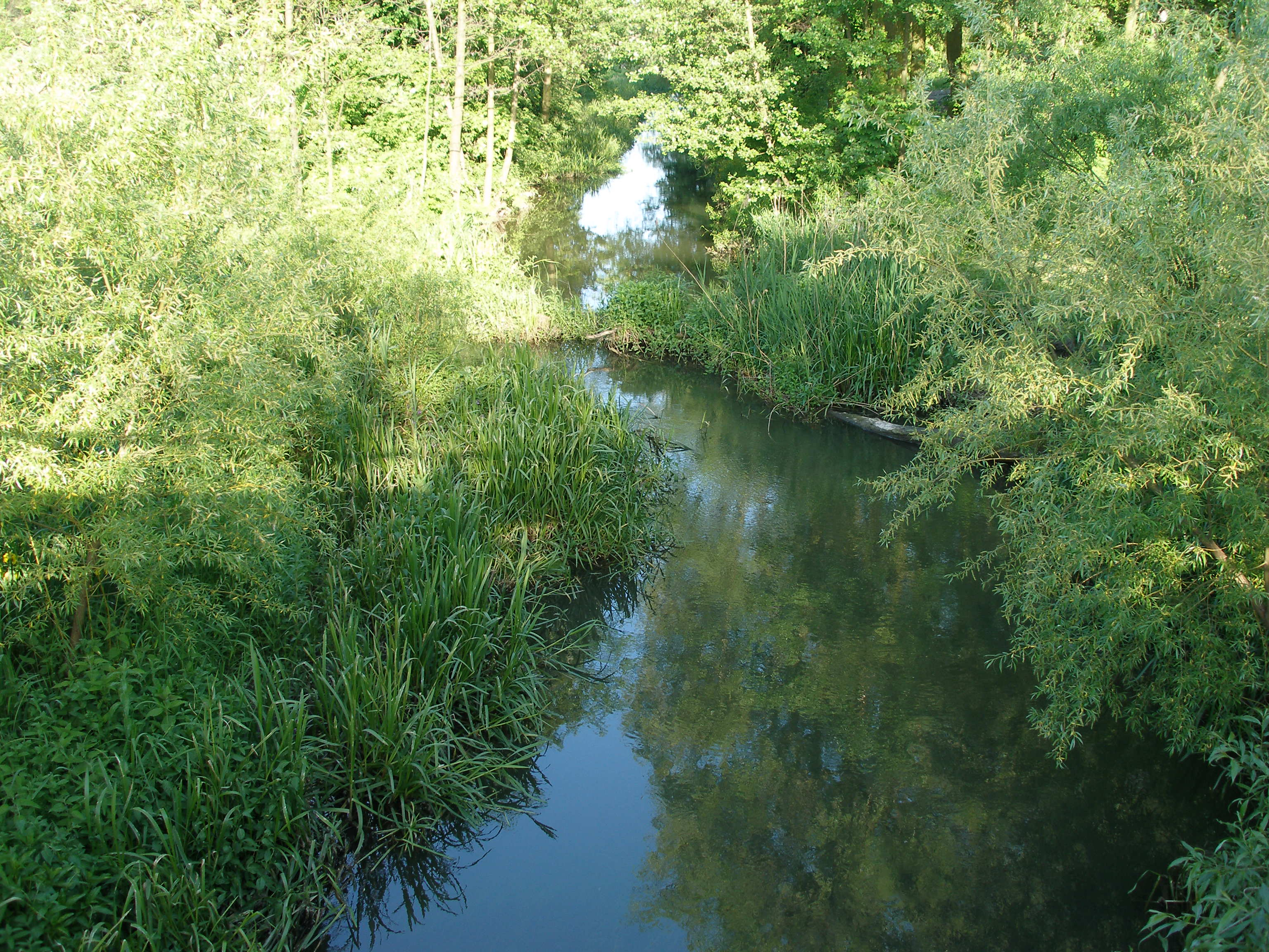 Wolica w Skierbieszowie